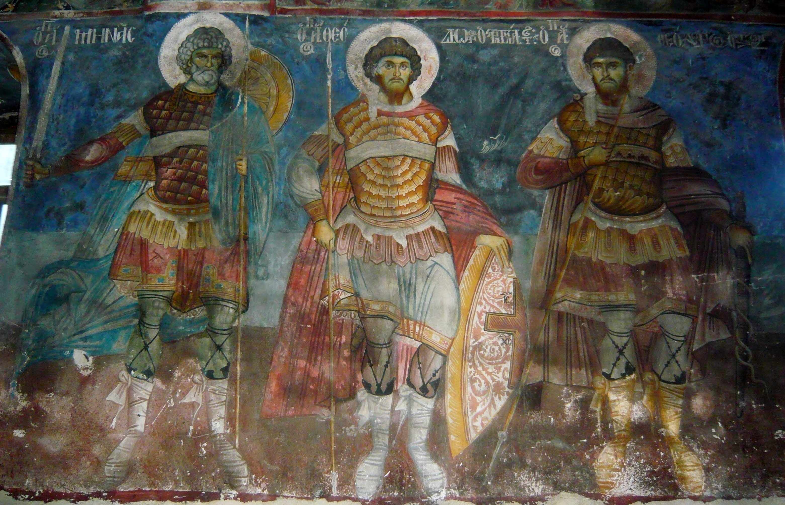 Kościół Świętego Mikołaja w Voskopojë. Freski w świątyni. 1726 r.